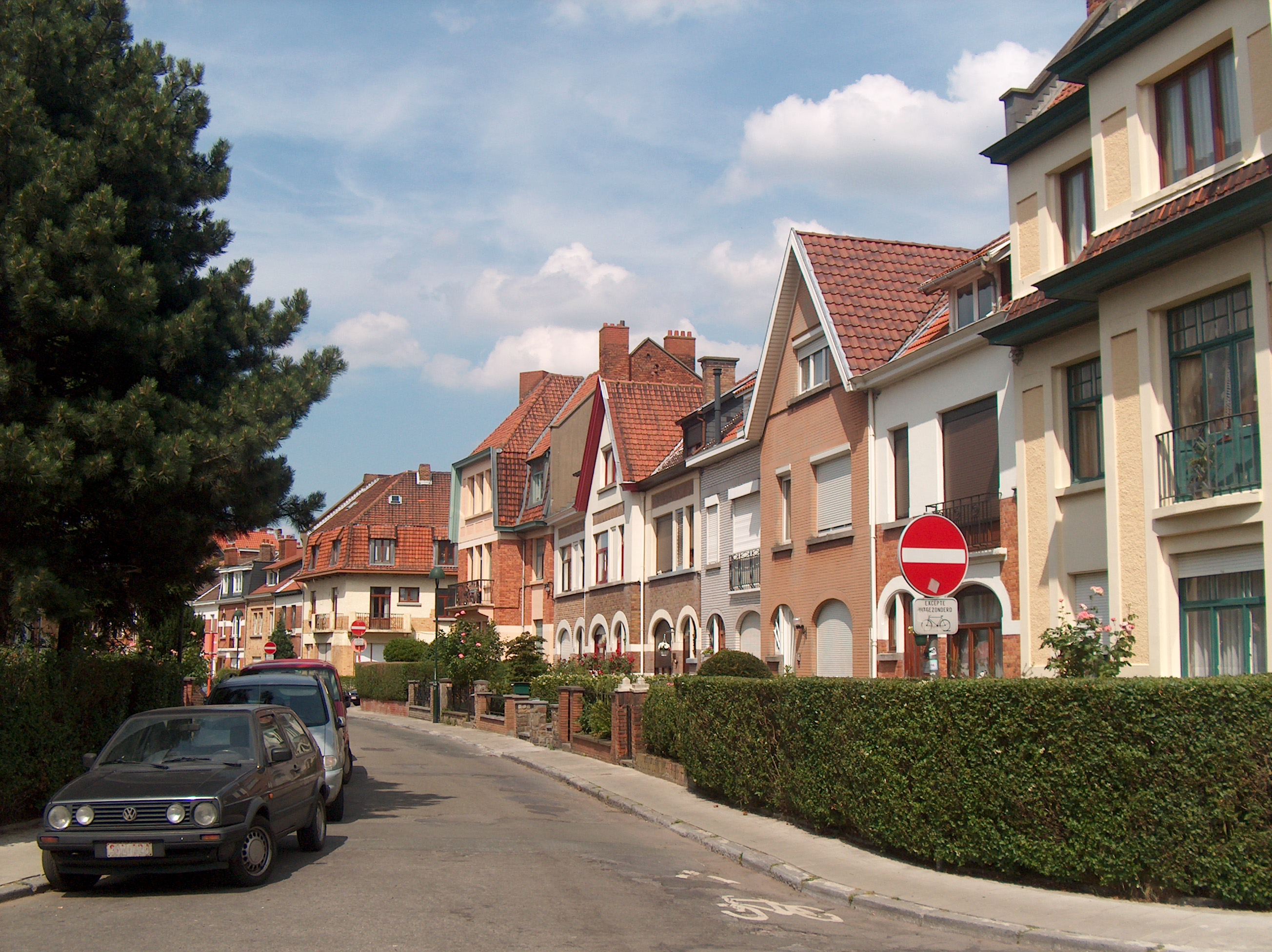 La rue Alexandre De Craene à Schaerbeek, Bruxelles, Belgique.